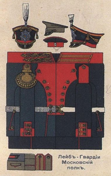 Форма обмундирования парадная лейб-гвардии Московского полка. 1910 год.